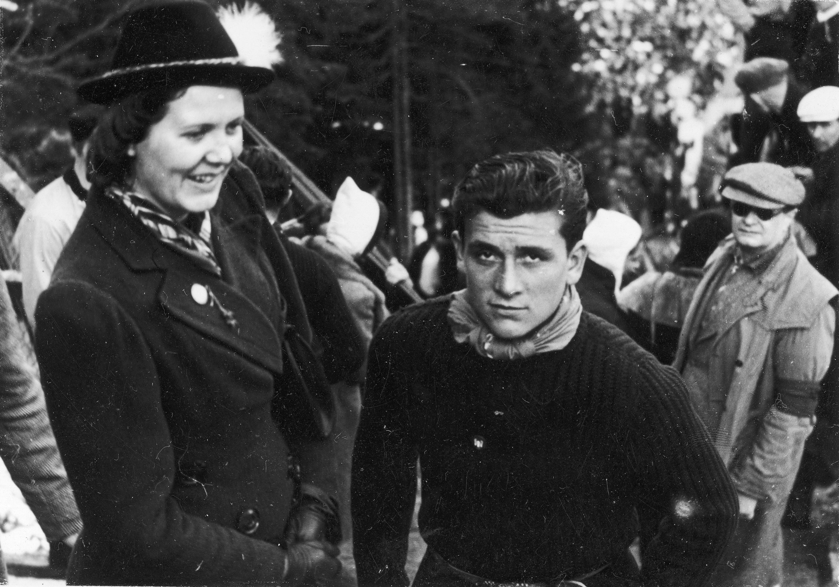 James Couttet à Zakopane en 1939